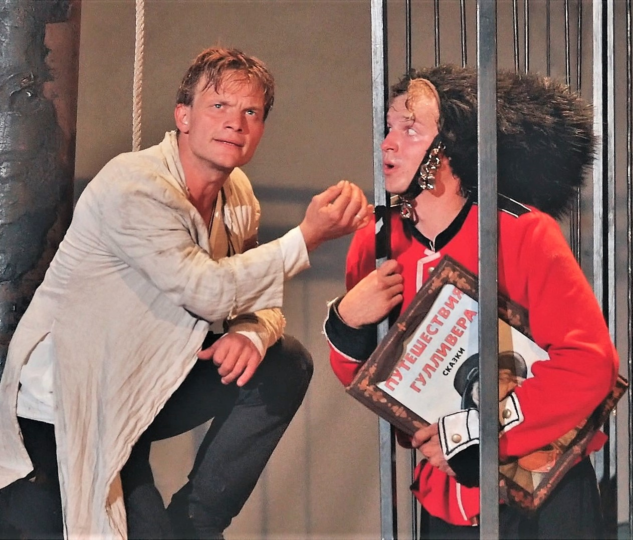 Сцена из спектакля "Danger, Gulliver!", конно-драматический театр "ВелесО", август 2018